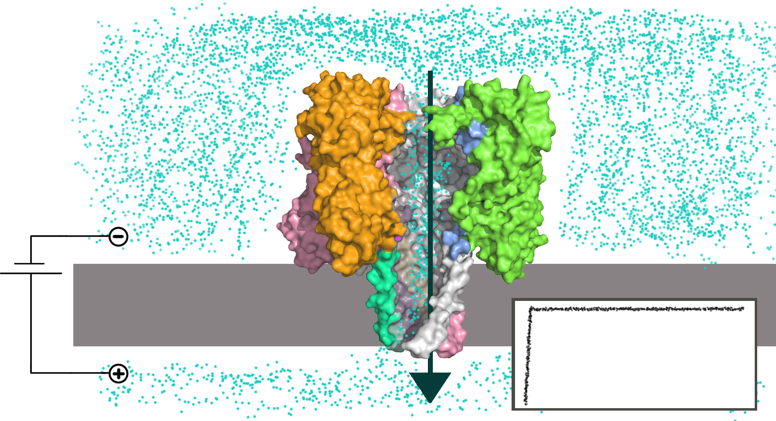 Нанопора альфа-гемолизина в мембране, под действием приложенного напряжения возникает ток ионов.